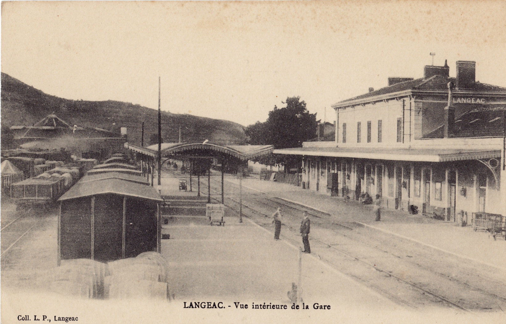 Carte postale ancienne éditée par LP à Langeac : LANGEAC - Vue intérieure de la Gare